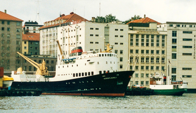 MS Nordfjord I og MS Haganes ligger ved Nykirkekaien i Bergen